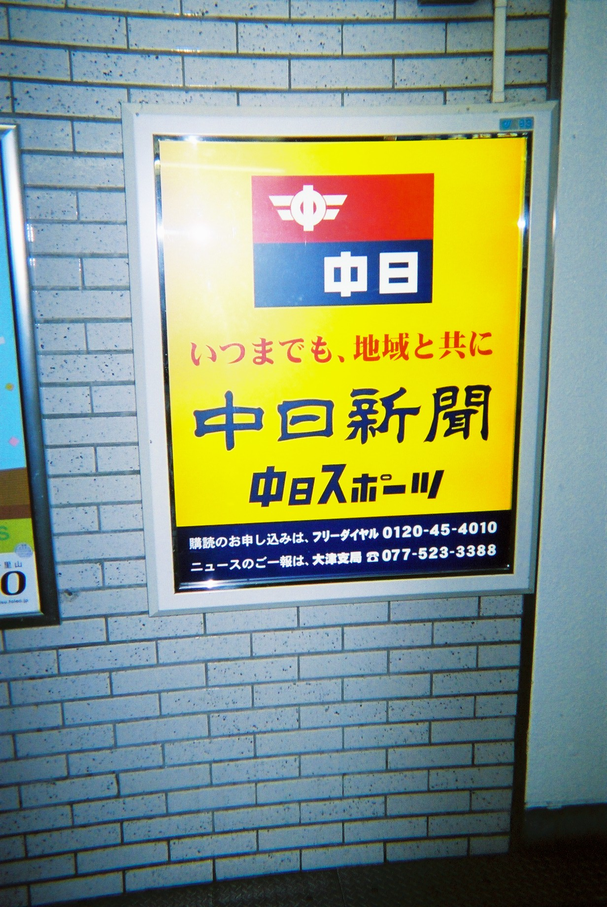 中日新聞看板